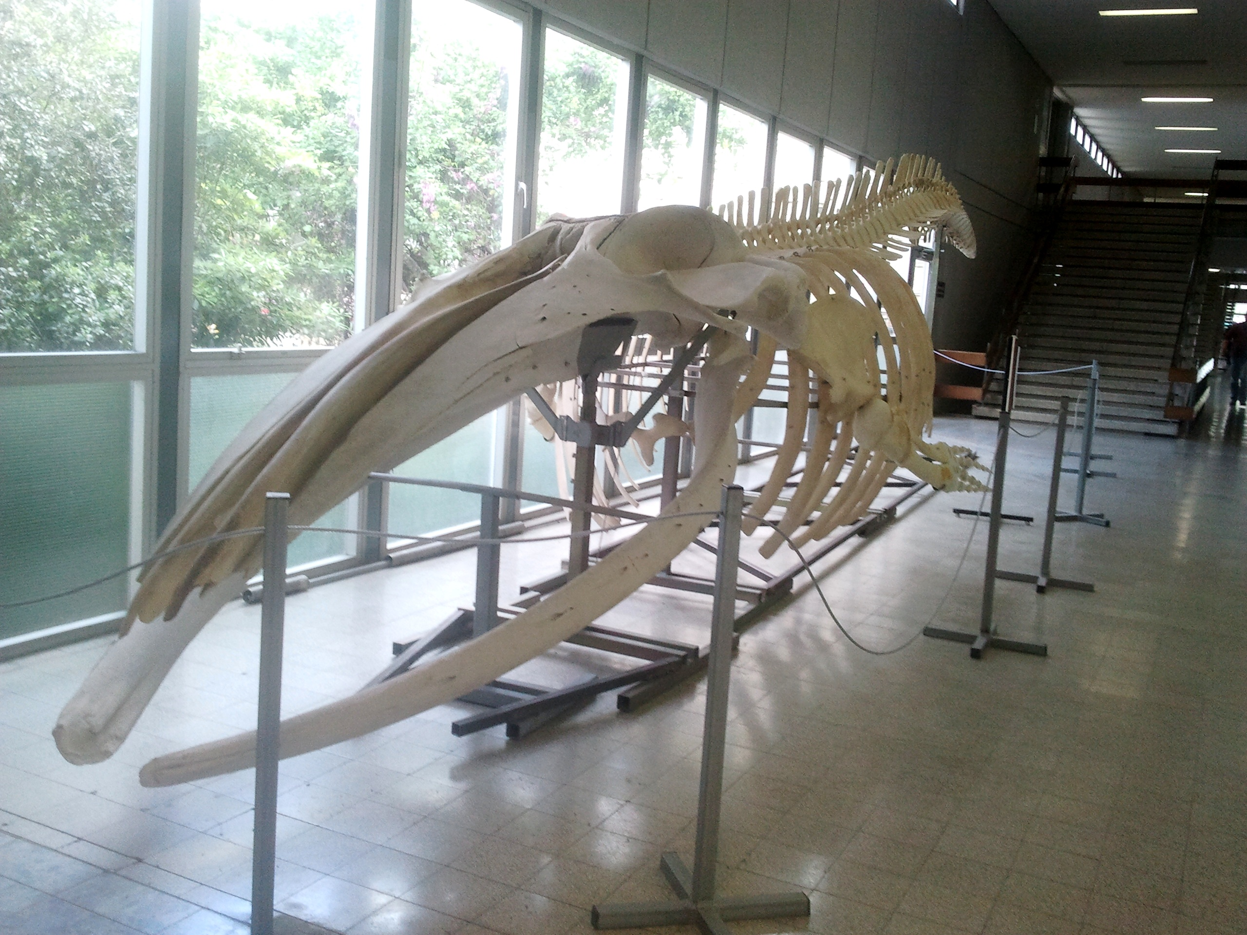 השלד של לוויתן מצוי זכר בגיל של שנה וחצי לערך. אורכו 14 מטר. הלוויתן נצפה ב-3 בפברואר 2008 במעגן של קו צינור הנפט אילת-אשקלון. נעשו ניסיונות להוביל אותו לים הפתוח שלא צלחו והוא מת. בדיקה חיצונית העלתה קטיעה חלקית של האונה השמאלית של הזנב שהגלידה. השלד מוצג במסדרון של הקומה הראשונה בבניין הרב תכליתי באוניברסיטת חיפה